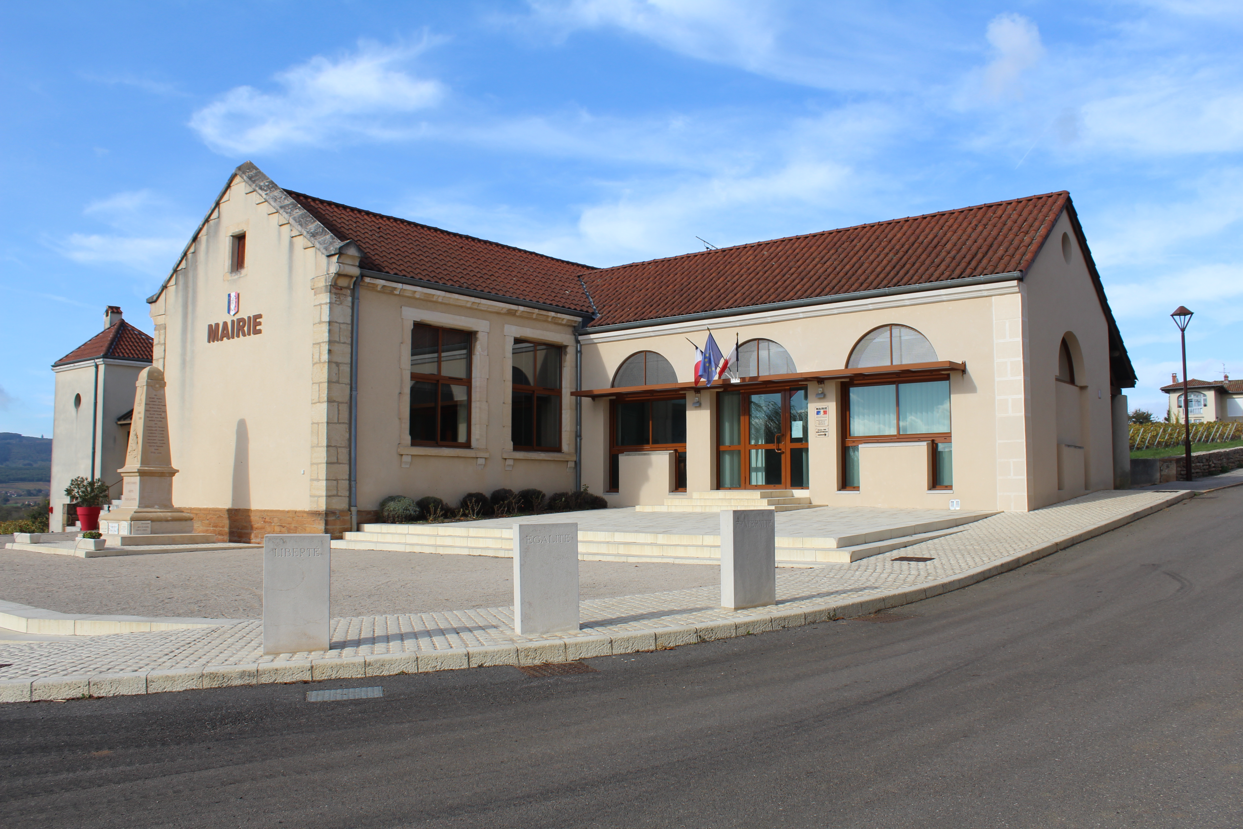 Mairie de Péronne, Saône-et-Loire.